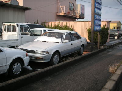 ST170コロナ